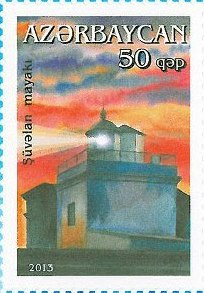 Lighthouses of Azerbaijan. N 1080 - 50 qapik. There are pictured Shuvalan lighthouse on the stamp.